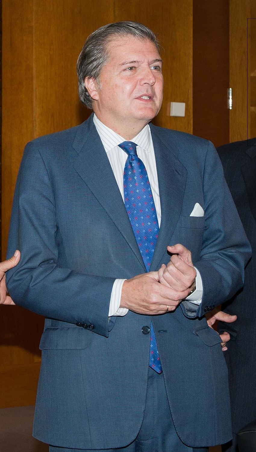 Firma del acuerdo de becas entre Colegio de Europa y Banco Santander